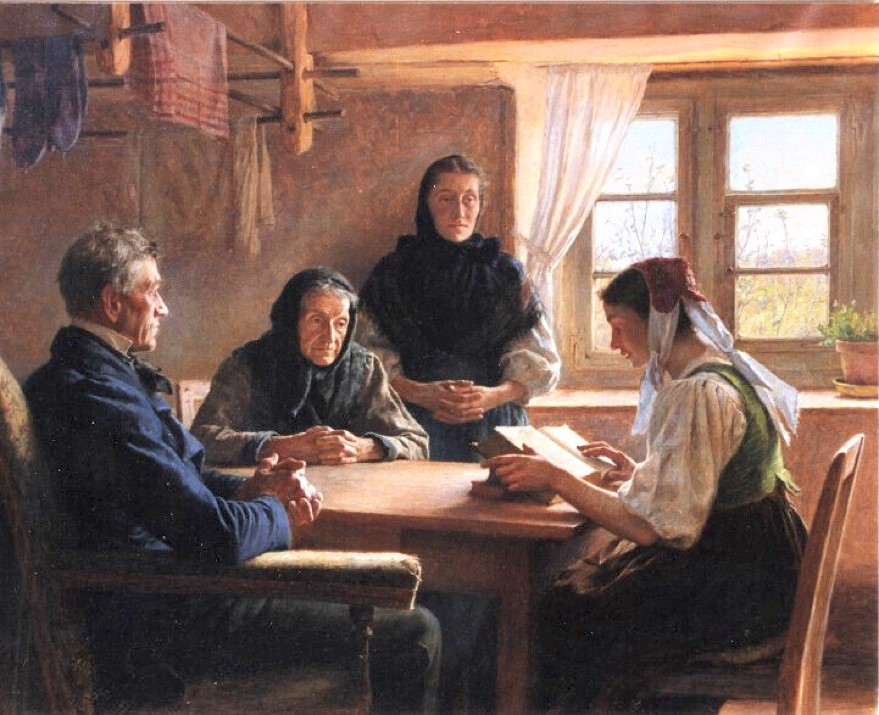 Lecture de la Bible dans un foyer du Pays de Montbéliard au XIXe siècle. La liseuse est en costume traditionnel.